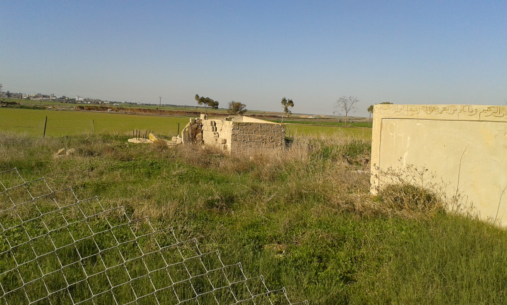 תחנת הרכבת שיח נוראן - מערבית לקיבוץ מגן - תחנה ראשונה אחרי רפיח על המסילה בין רפיח לבאר שבע